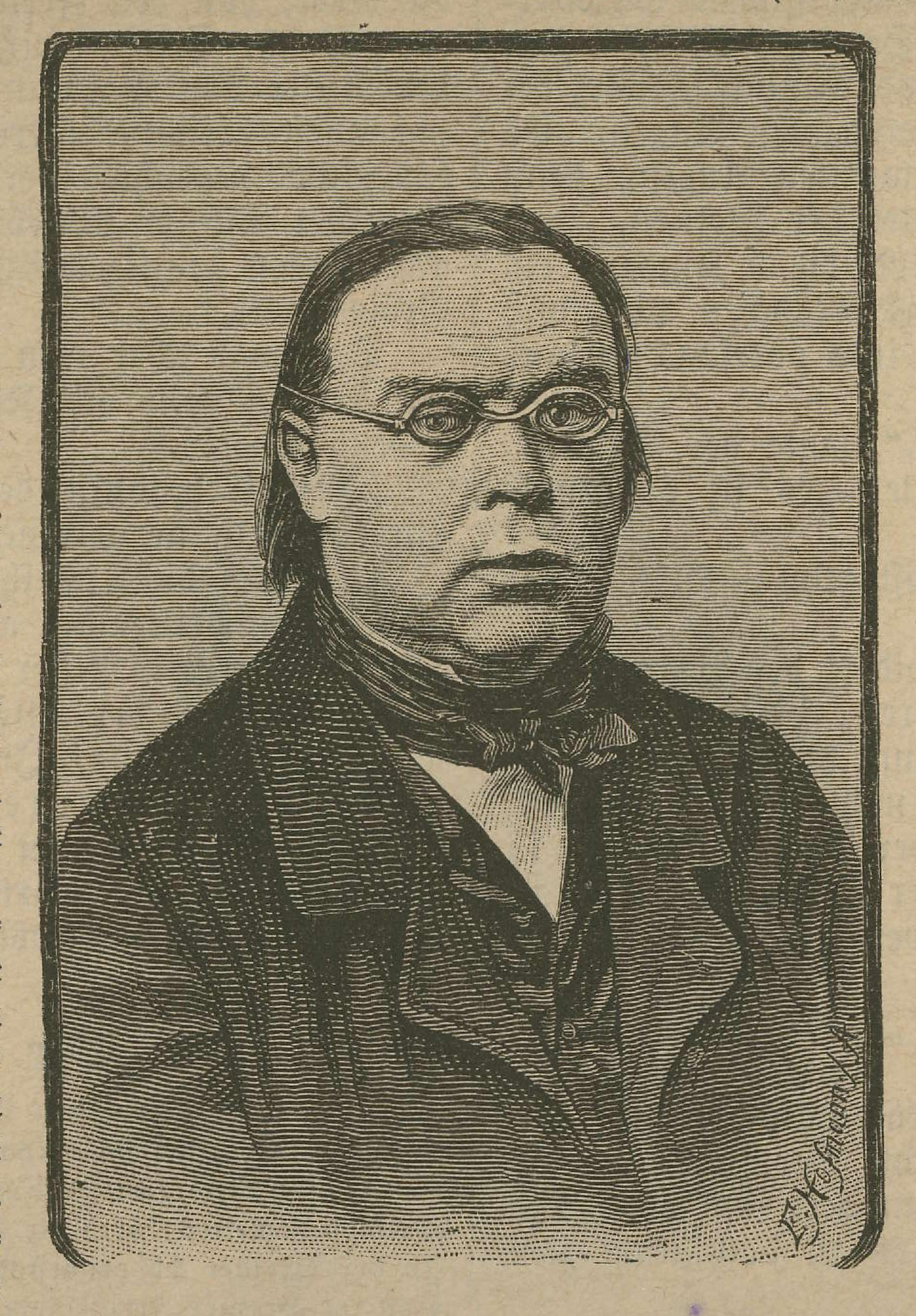 Drei Württemberger. In: Katholischer Volks- und Hauskalender, Stuttgart 1887, S. 37